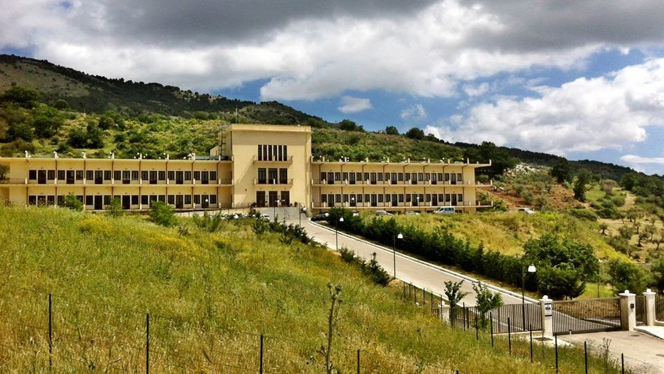 Per volere dell'onorevole arbëresh Rosolino Petrotta (1894 - 1969) fu costruito negli anni '50, alle pendici di Pizzo Garrone in contrada Ogiditria, ai piedi del monte Pizzuta, un grande complesso architettonico a tre elevazioni, inizialmente nuovo ospedale di Piana degli Albanesi. Abbandonato, è da poco struttura destinata ad attività residenziale per anziani non autosufficienti (R.S.A. di Piana degli Albanesi) con necessità di cure integrate sanitarie e socio-sanitarie.